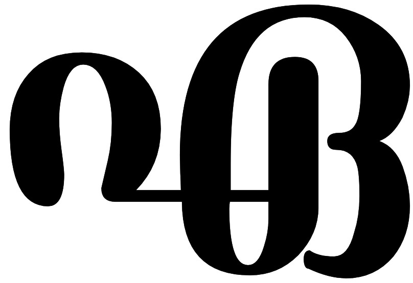 ഏ അക്ഷരം